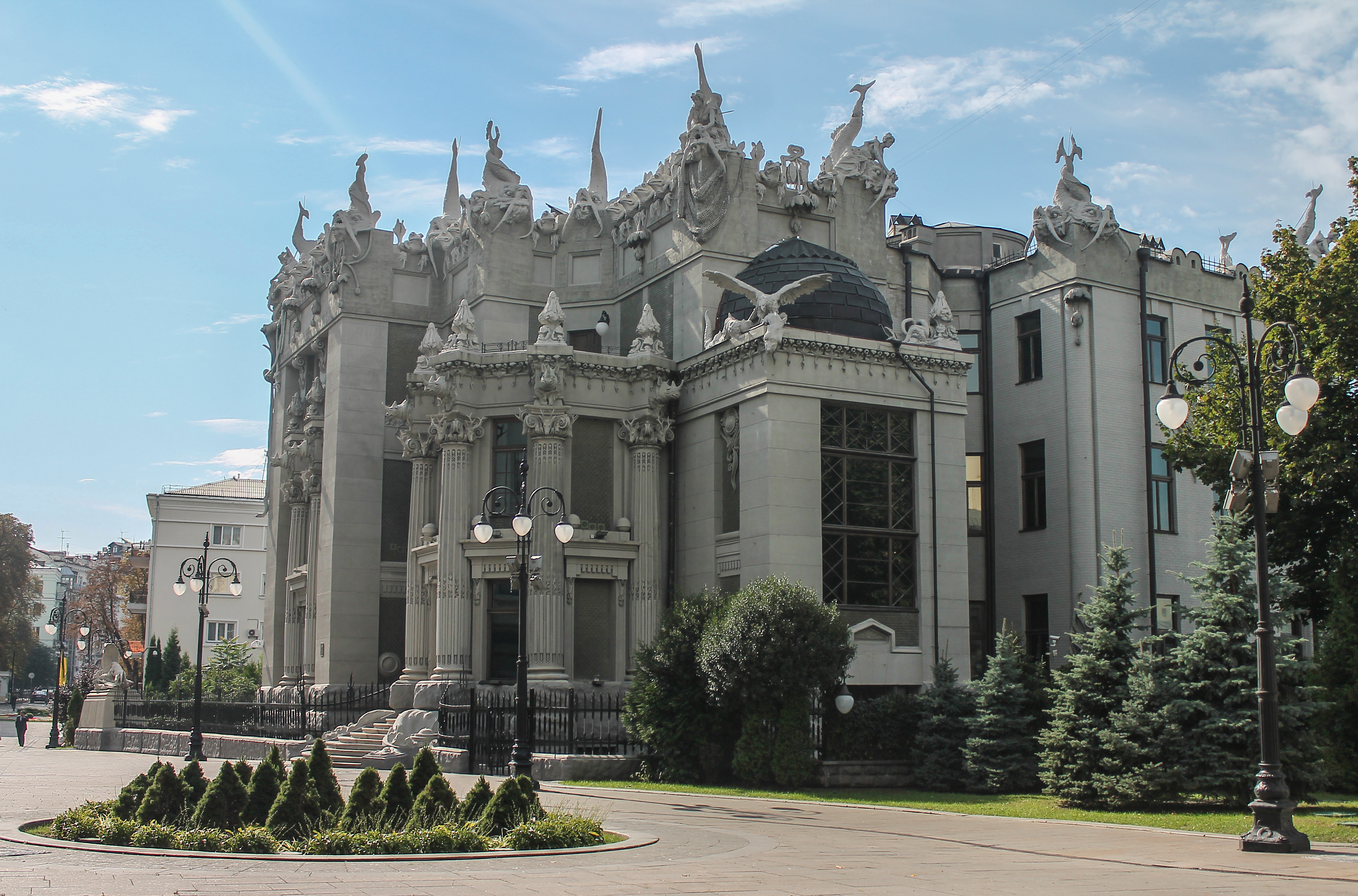 Будинок прибутковий, в якому жив В. В. Городецький, архітектор, Київ, Банкова вул., 10